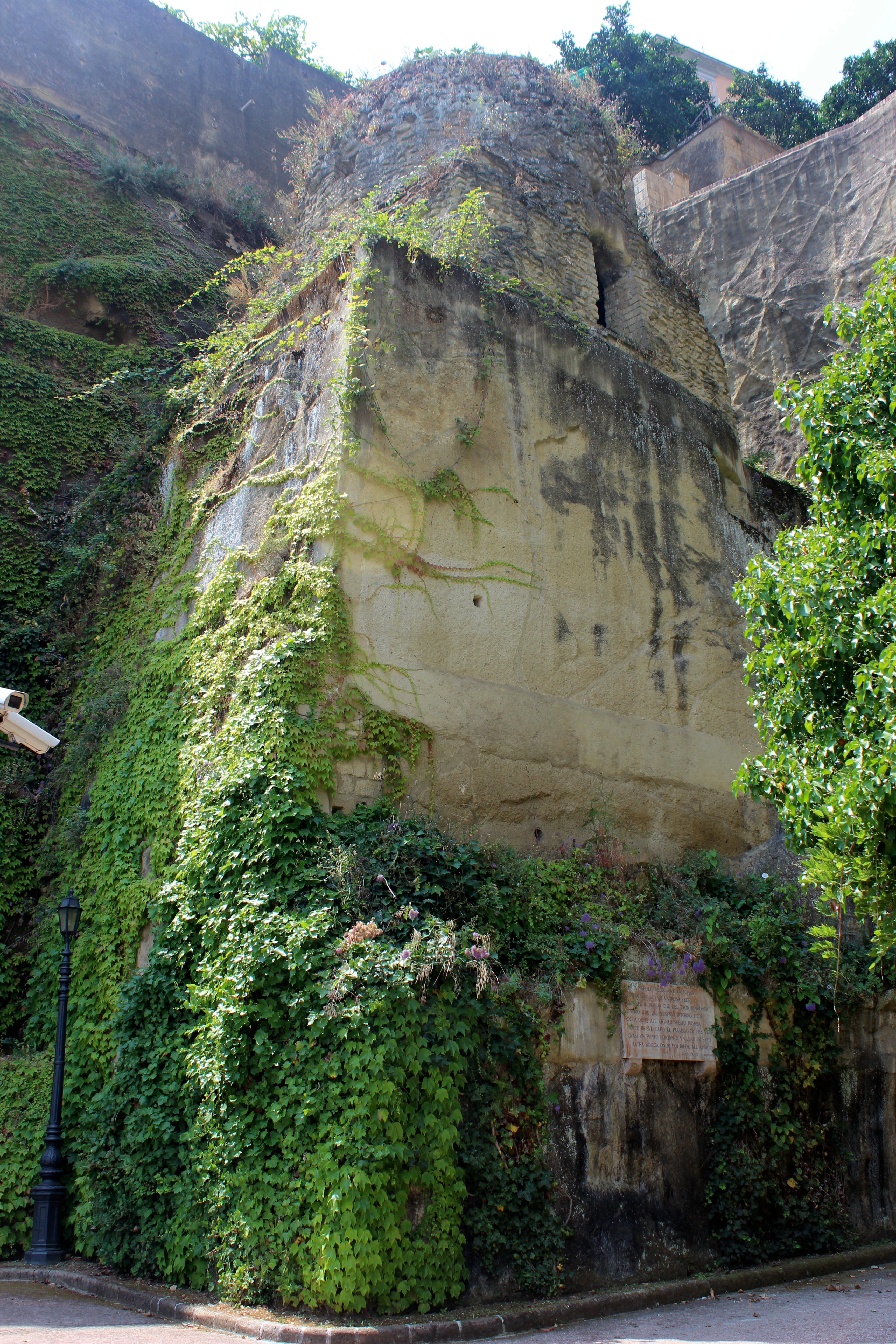 Nápoles. Supuesta tumba de Virgilio en Piedigrotta.